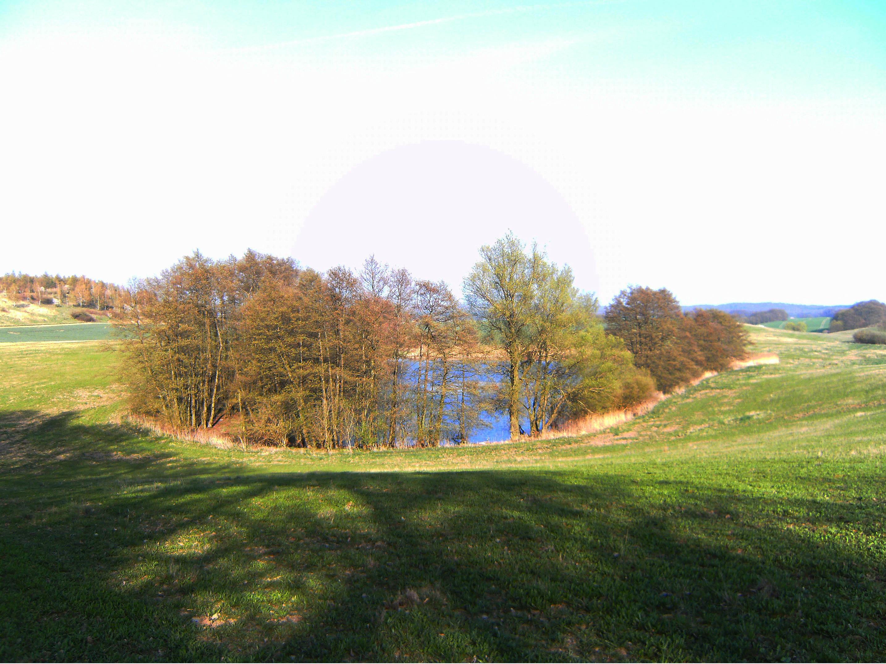 Söll am Fuchsberg in den Brohmer Bergen